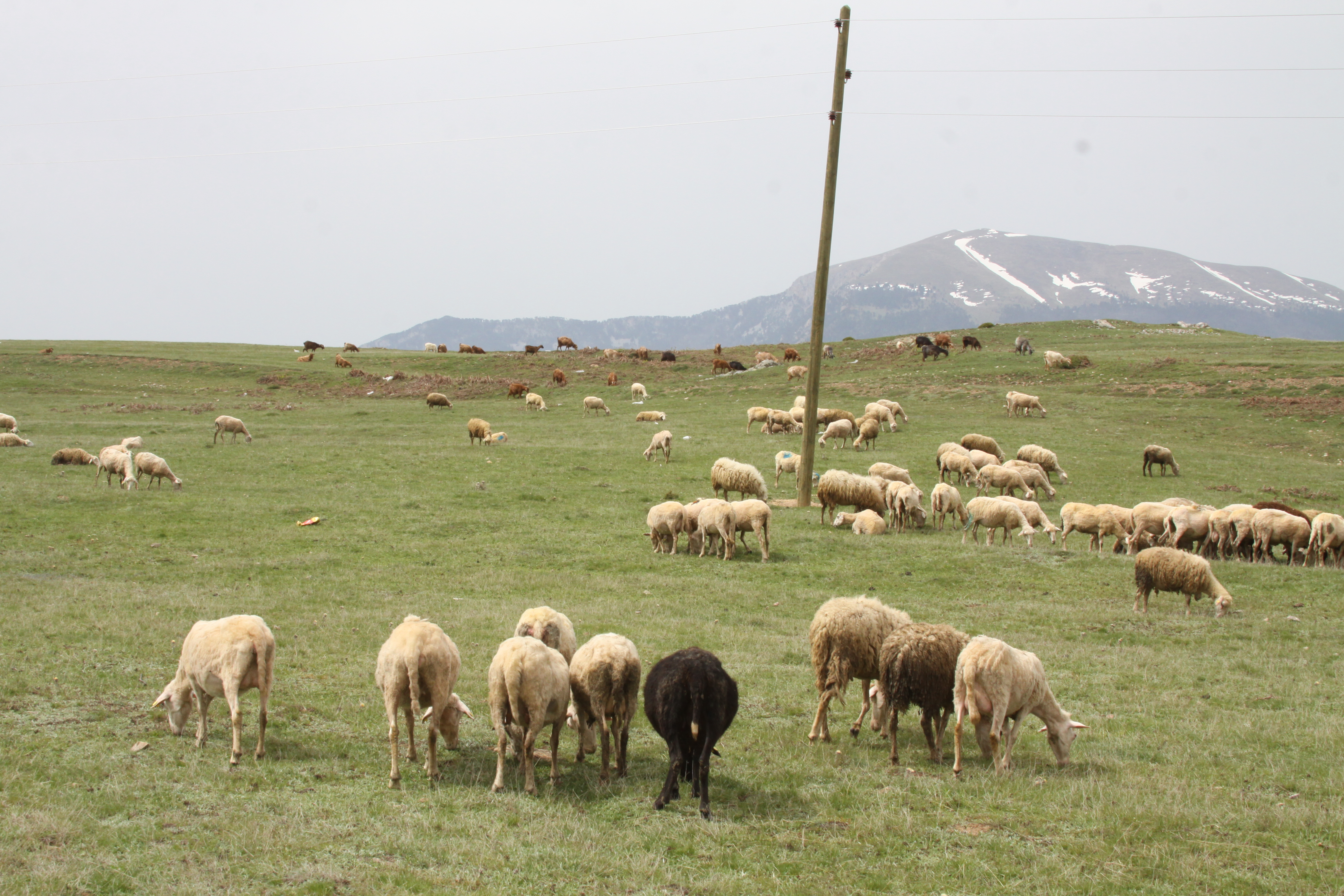 Kullotja e deles Rude ne Shishtavec